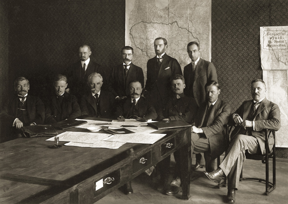 Fourth Ministers` cabinet of Lithuania, Kaunas 1919. From left siting: Justinas Zubrickas, Juozas Paknys, Petras Leonas, Prime minister Mykolas Sleževičius, Antanas Merkys, Steponas Kairys, Jonas Vileišis; standing - Aleksandras Stulginskis, Jokūbas Šernas, Voldemaras Vytautas Čarneckis, Tadas Petkevičius.